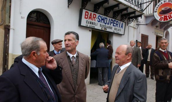 Insegna in lingua albanese del Bar Shqjpëria (Bar Albania)